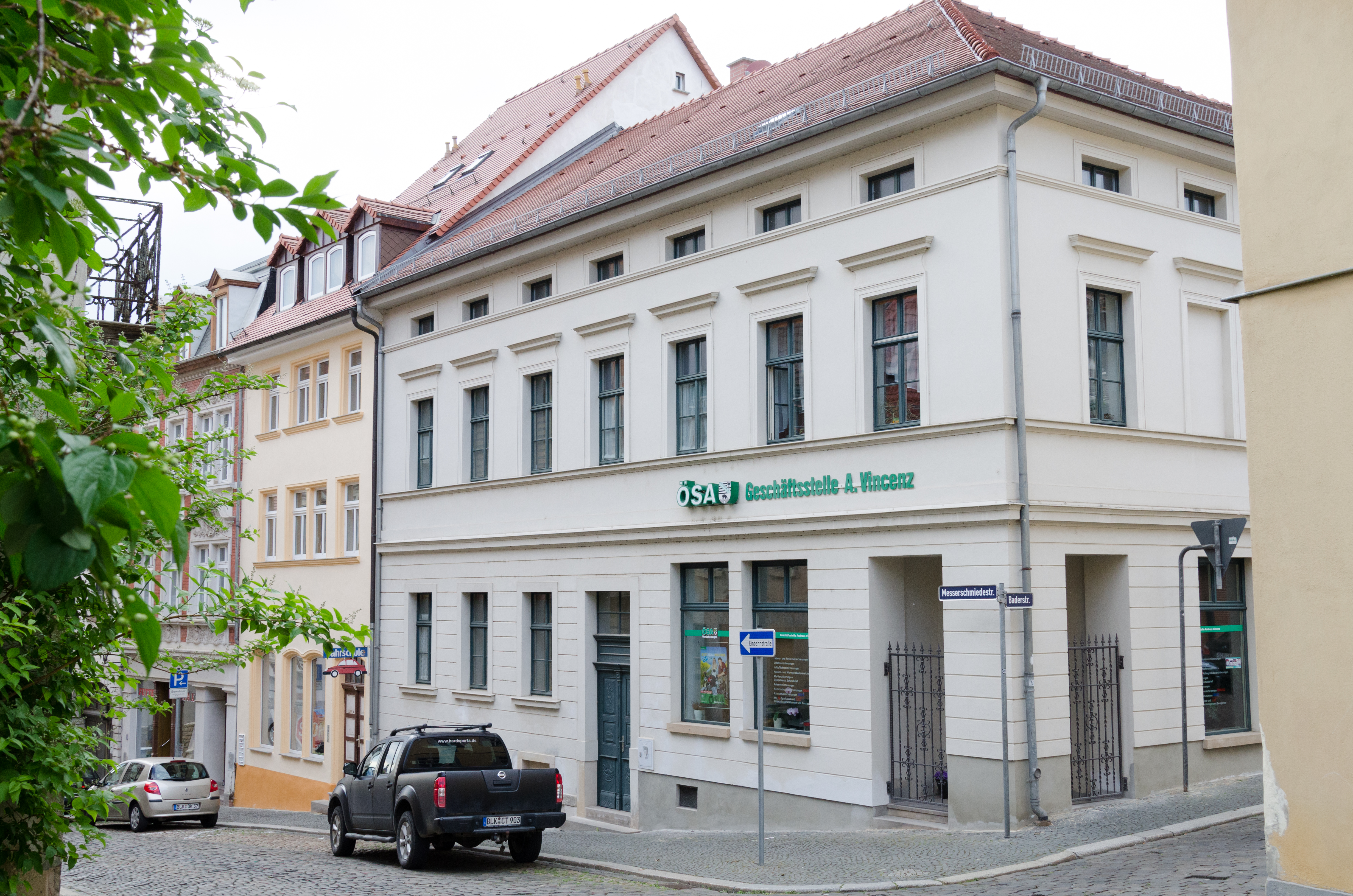 Zeitz, Messerschmiedestraße 6